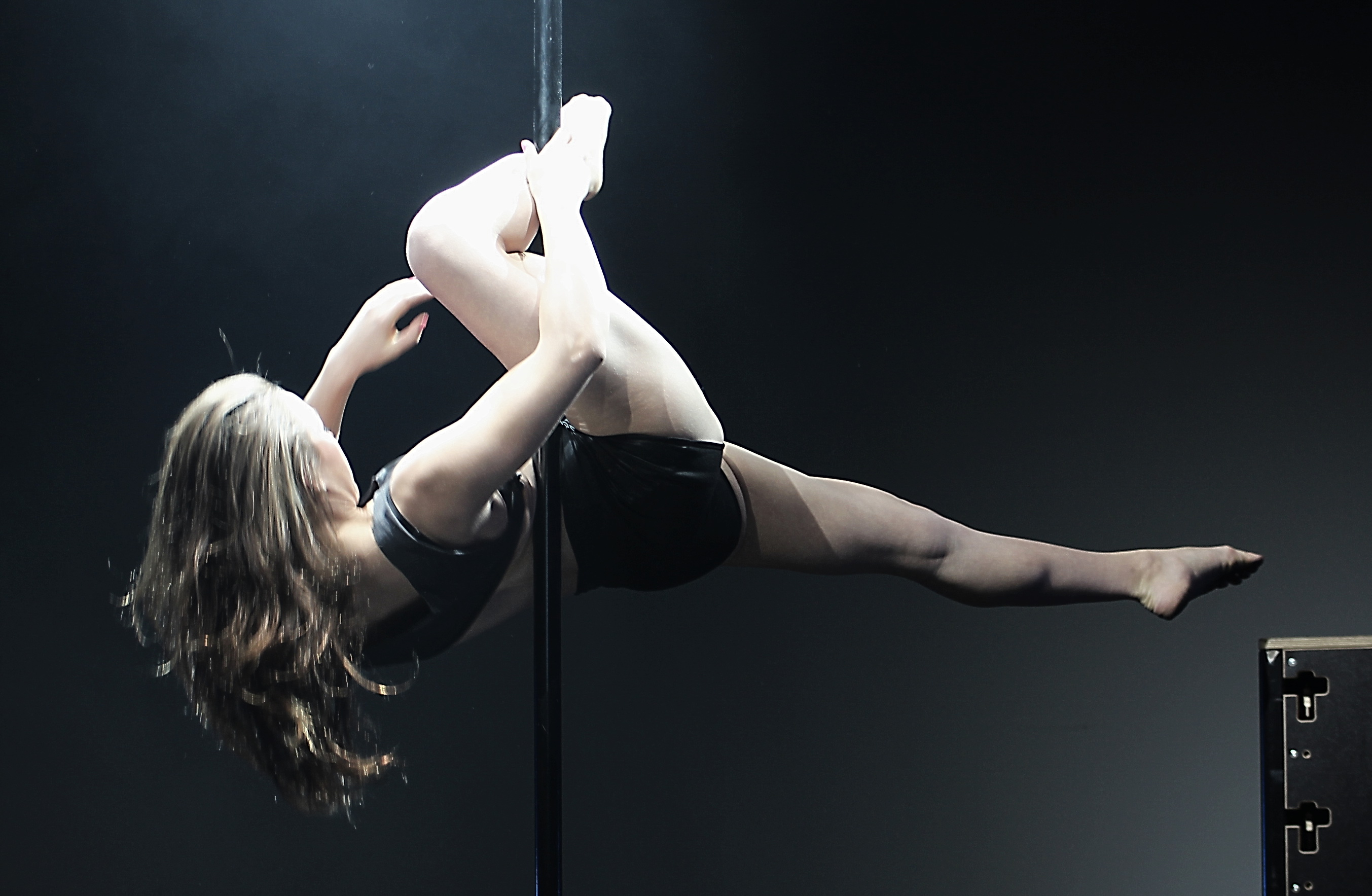 Tänzerin an der Stange bei der Veranstaltung 5 Jahre BMW Welt.